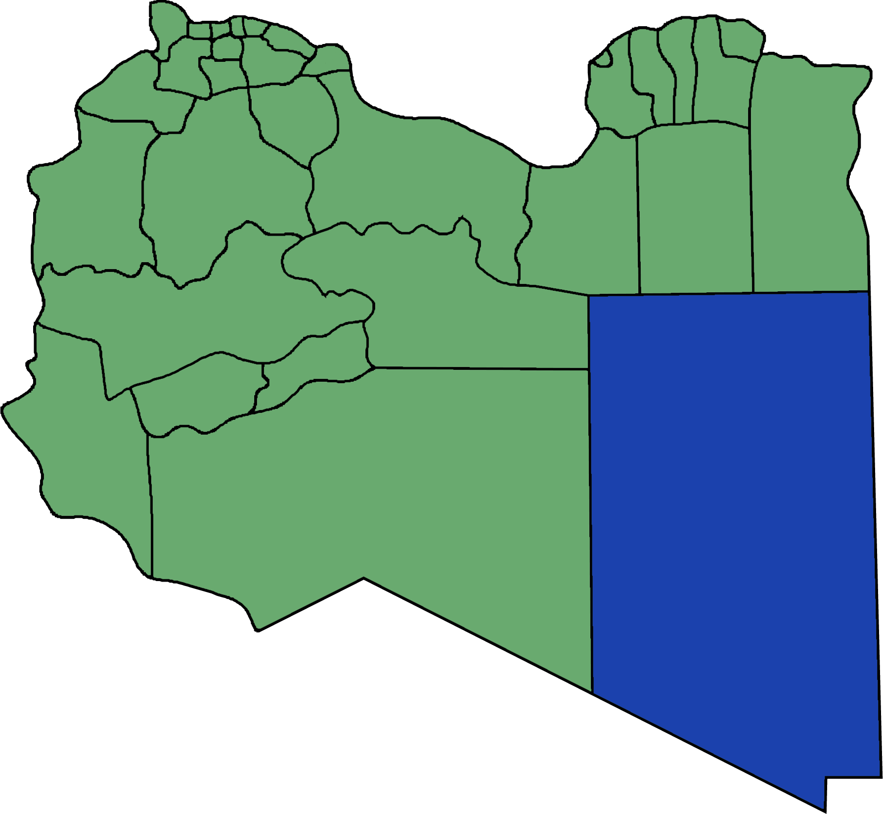 Die neuen Gemeinden (Munizipien) in Libyen. Al Kufrah hervorgehoben.